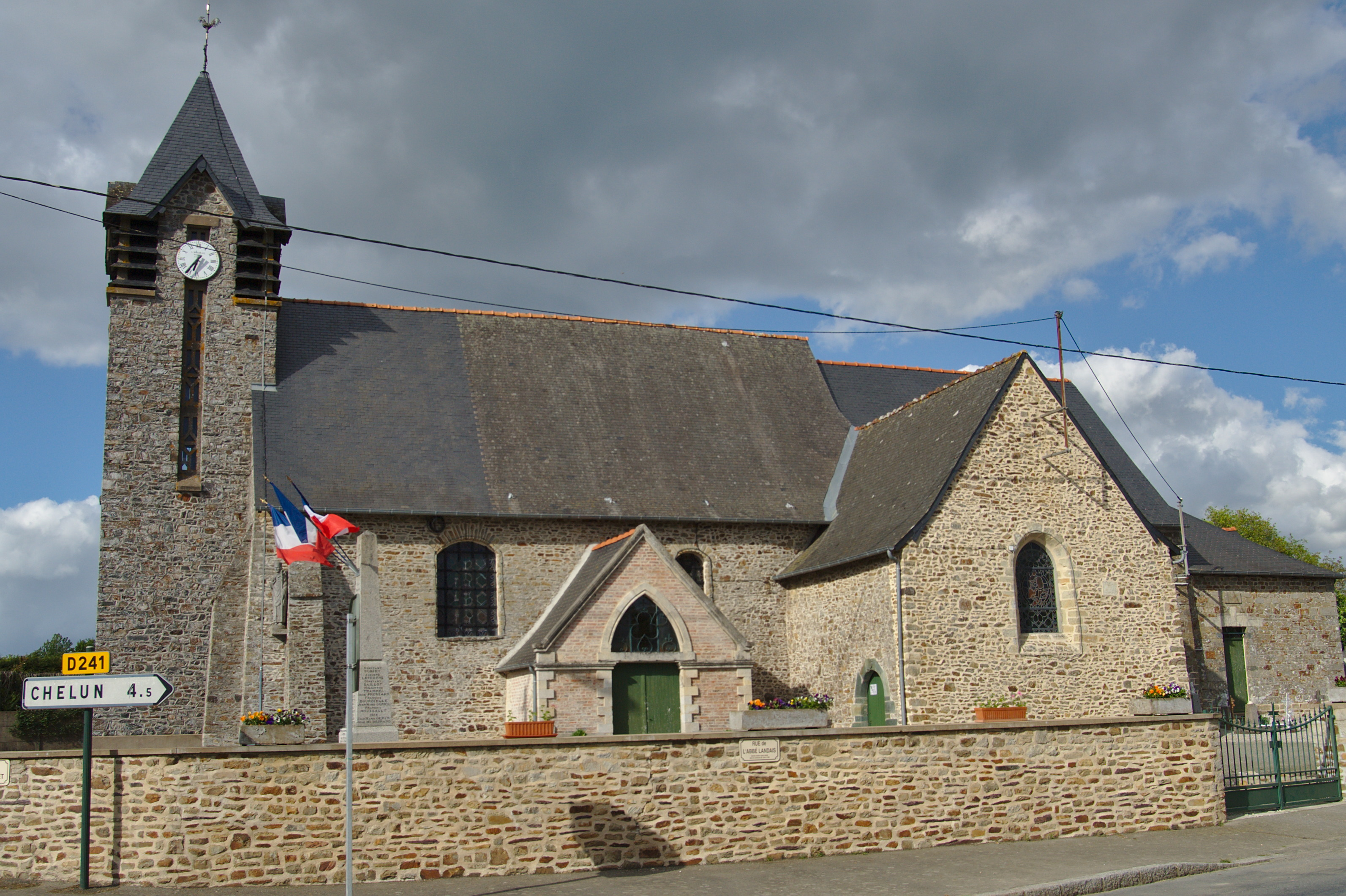 Église Saint-Martin de Forges-la-Forêt.